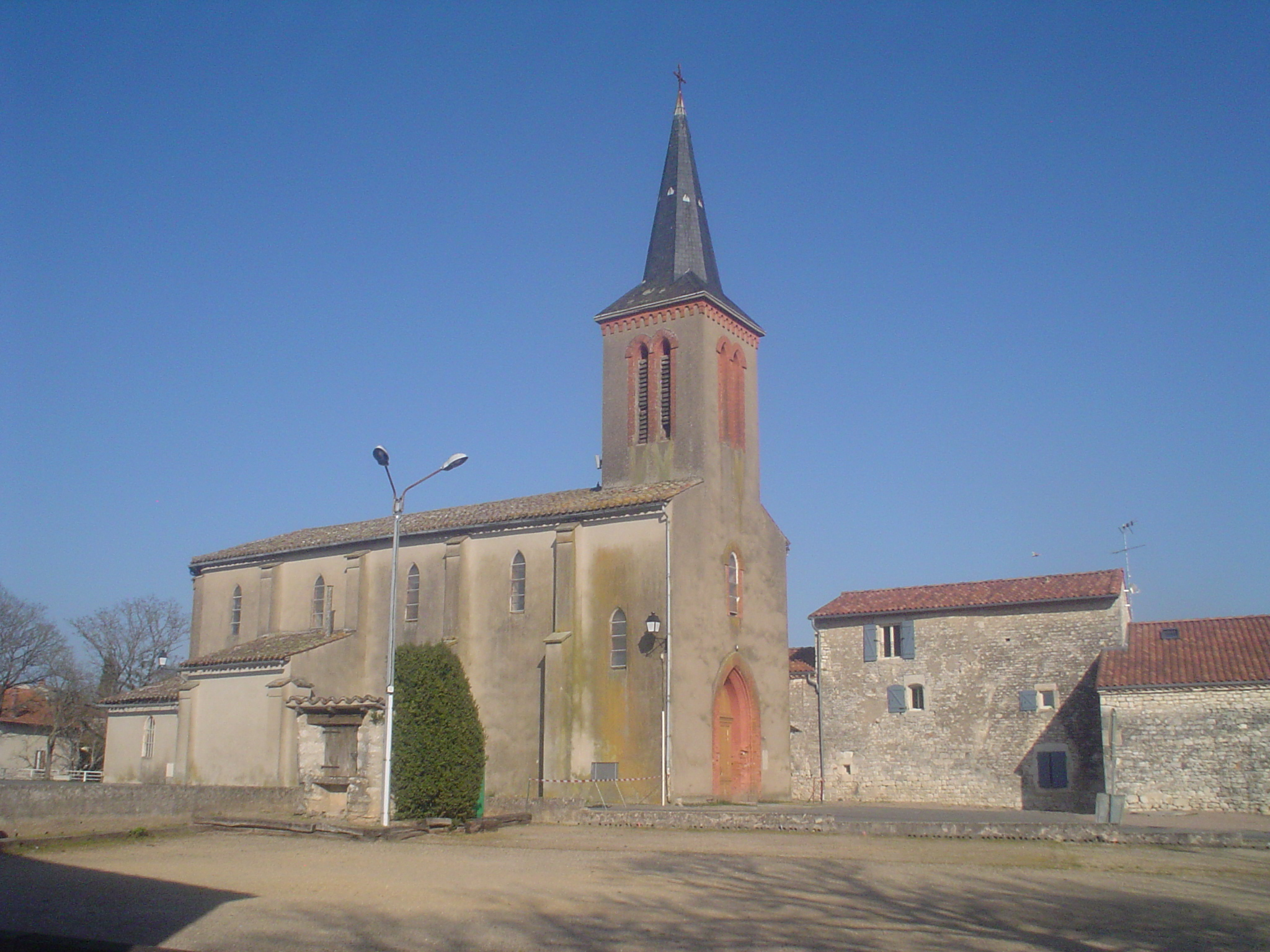 Église de Taïx